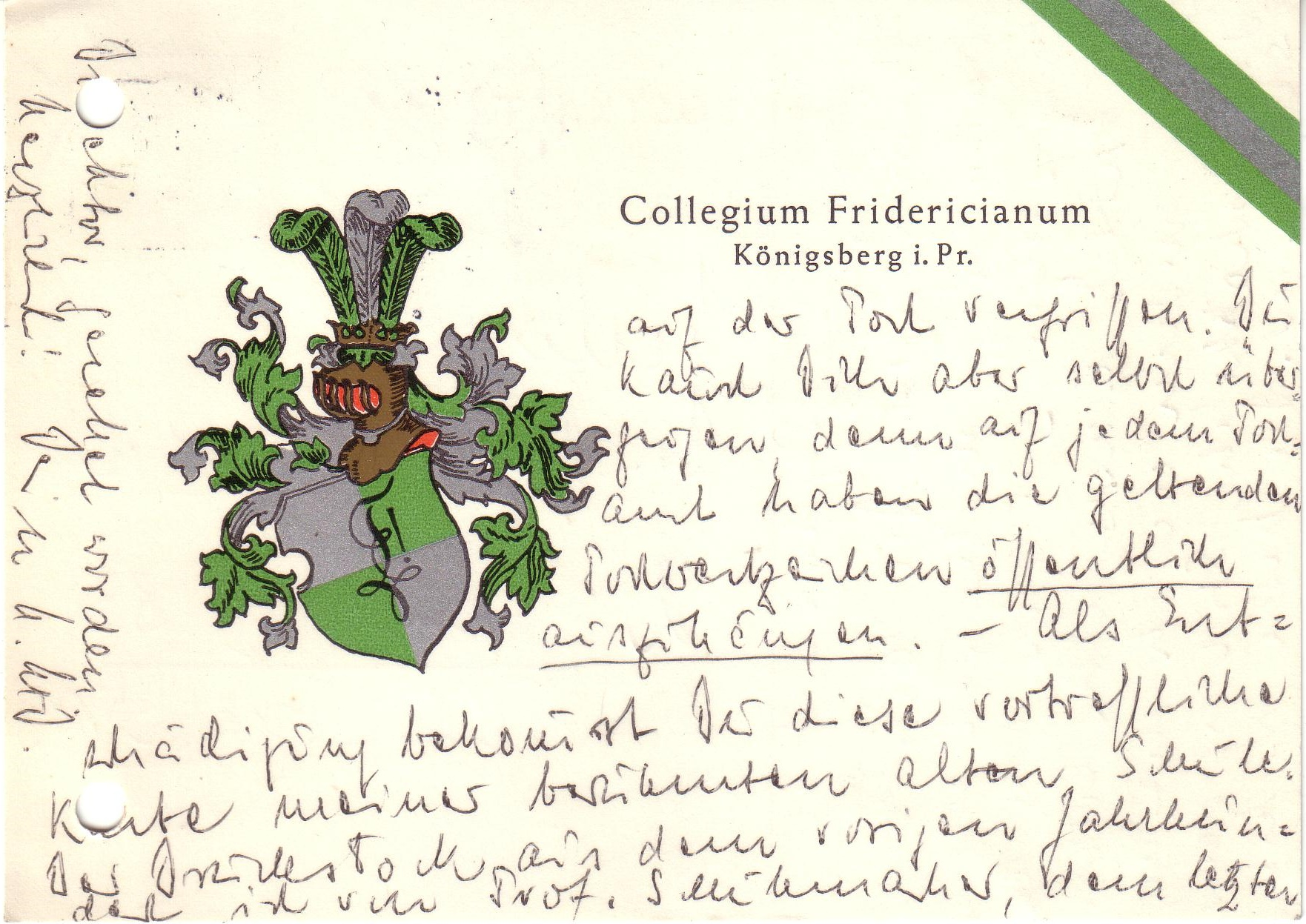 Postkarte des Collegium Fridericianum in Königsberg in Preußen